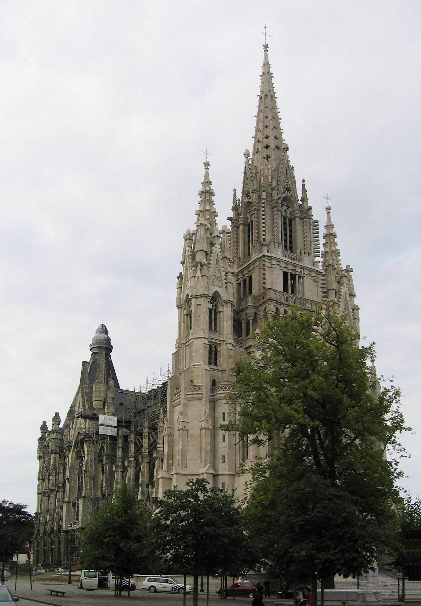 Eglise (royale) Notre-Dame de Laeken, à Bruxelles (Belgique)